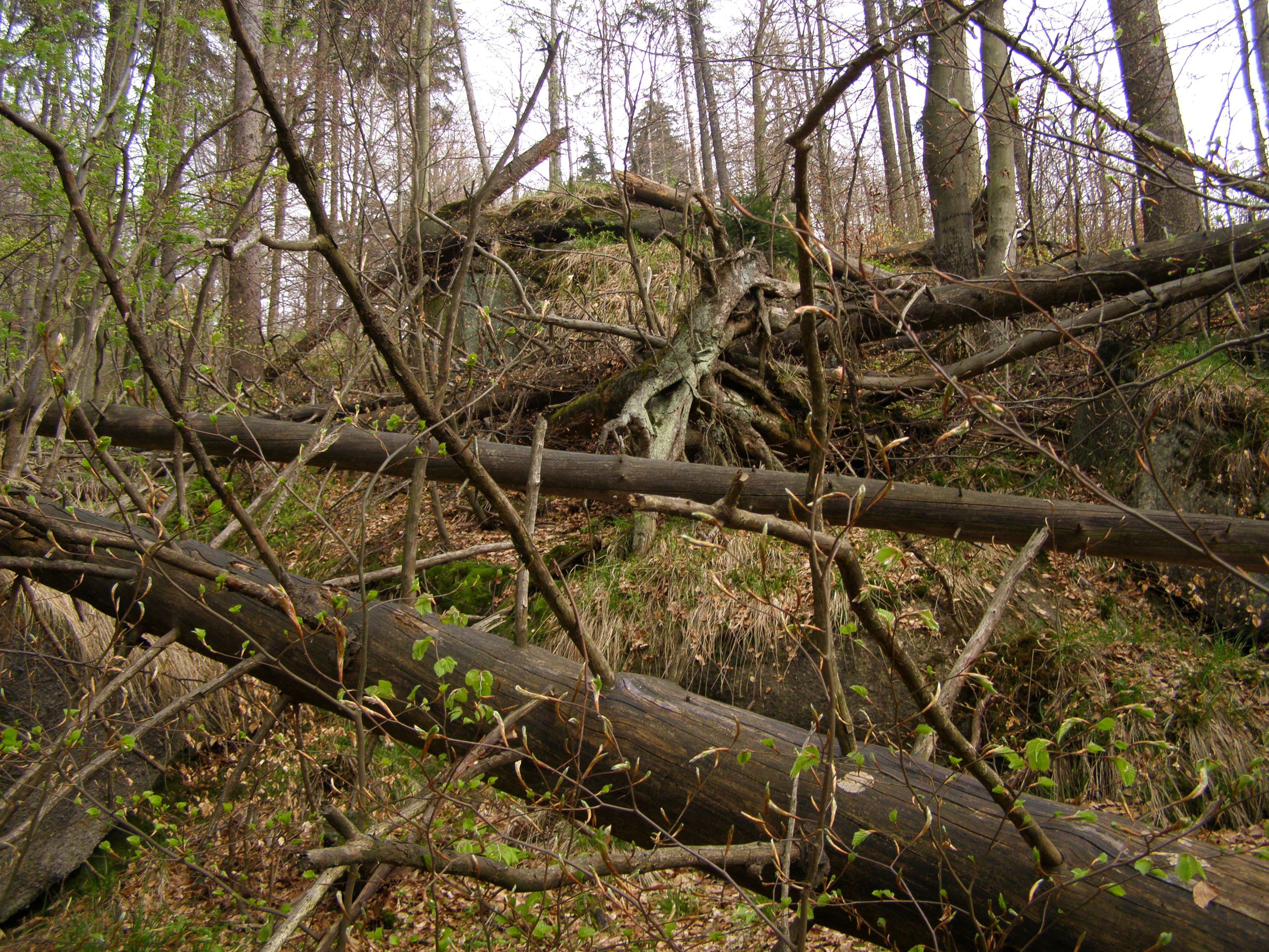 Česky: Oldřichovská vrchovina, NPR Jizerskohorské bučiny, severozápadní úbočí vrcholu Stržový vrch (704 m)